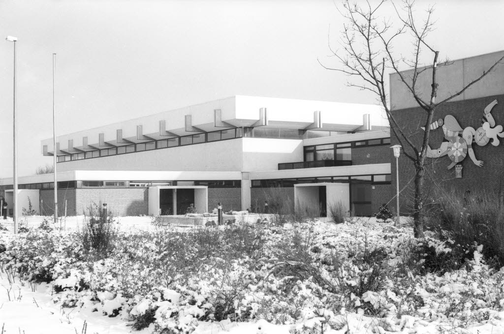 im Winter.